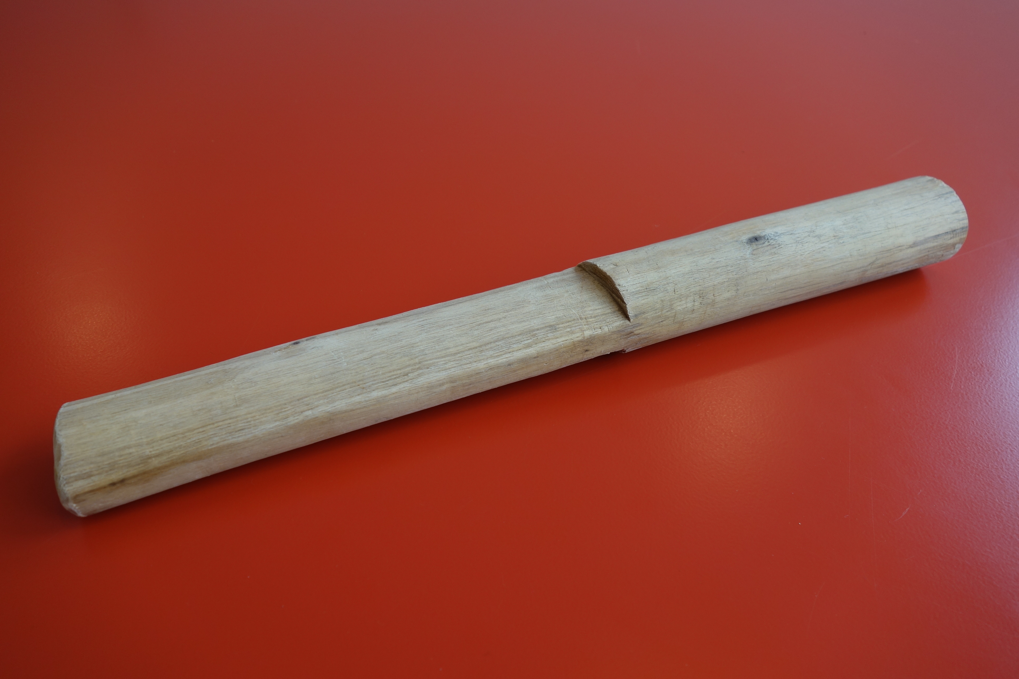 Palu da fúnchi is een hulpmiddel om polenta te kunnen maken. This file was uploaded to Wikimedia Commons in the context of the project Wiki goes Caribbean, initiated by Wikimedia Nederland. . This tag does not indicate the copyright status of the attached work. A normal copyright tag is still required. See Commons:Licensing.